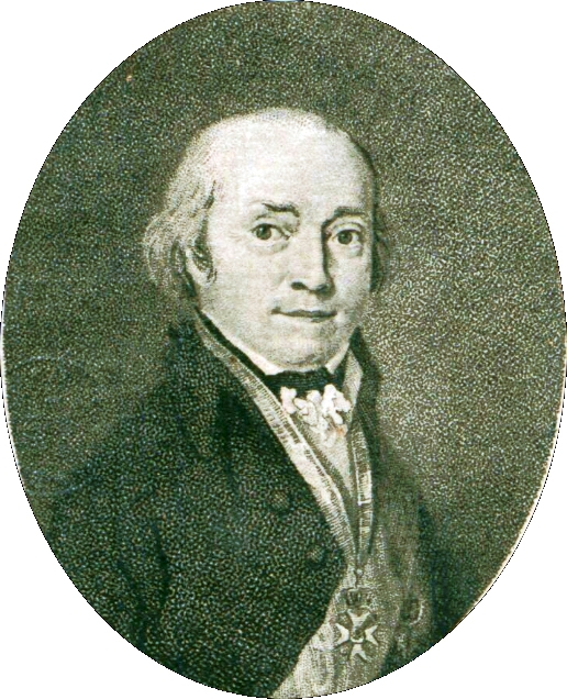 Christian Curt (Kurt) Graf von Haugwitz, Freyherr (Freiherr) zu Krappitz